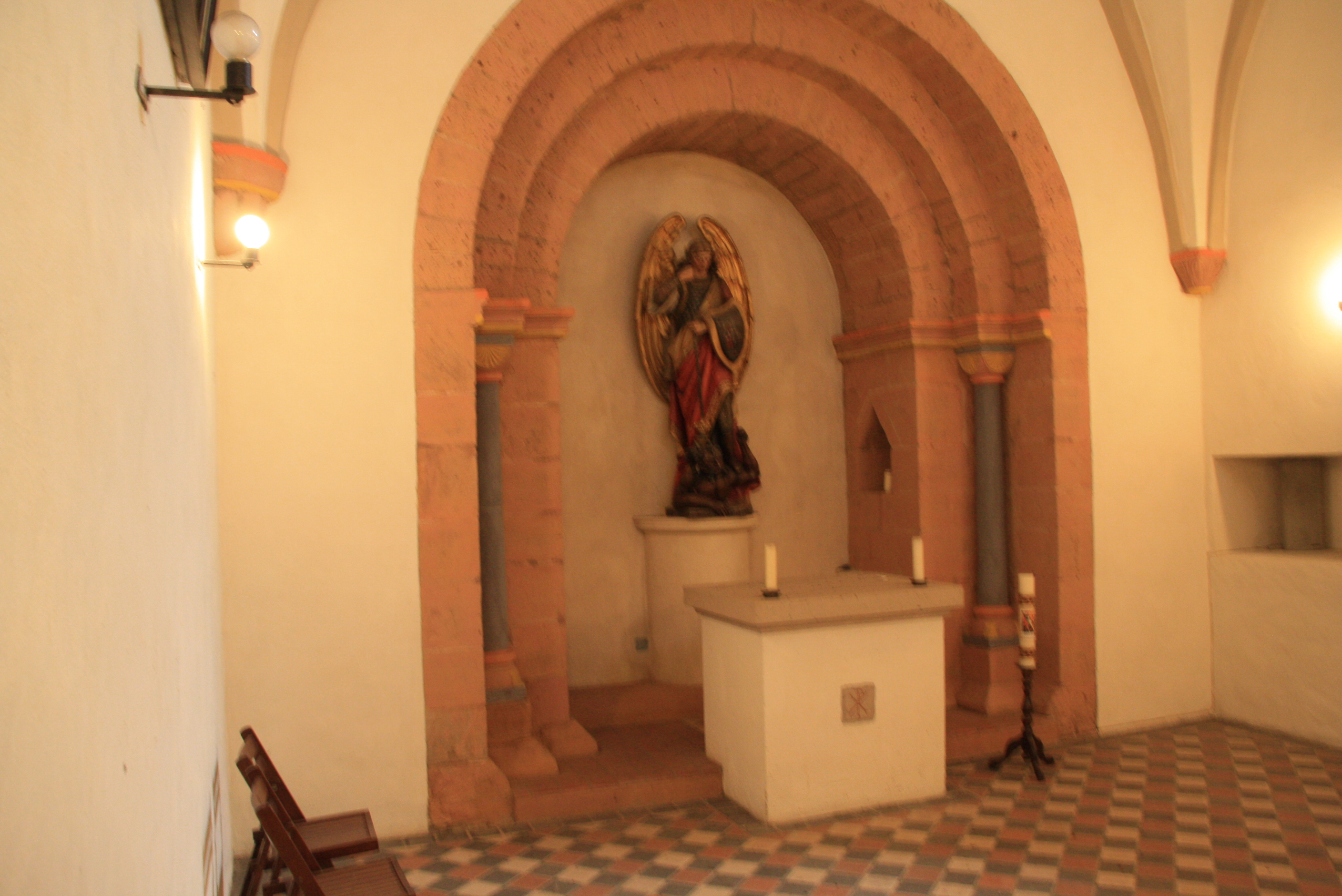 Die Kirche St. Viktor in Hochkirchen